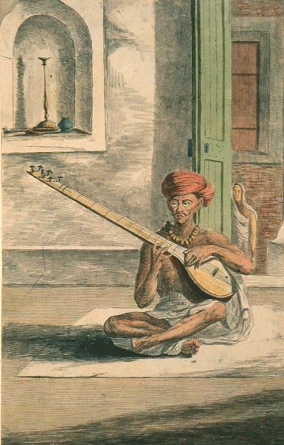 Ilustración del siglo XVIII de un zurdo tocando un sitar